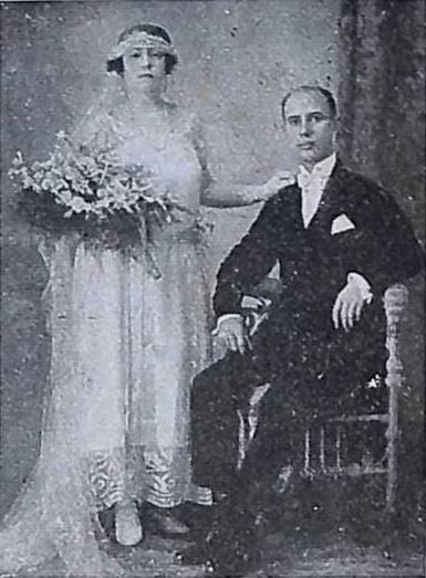 Voda de Eladio Vázquez Ferro e Eloisa Filgueiras Parapar 1924, fotografía en Vida Gallega 1925